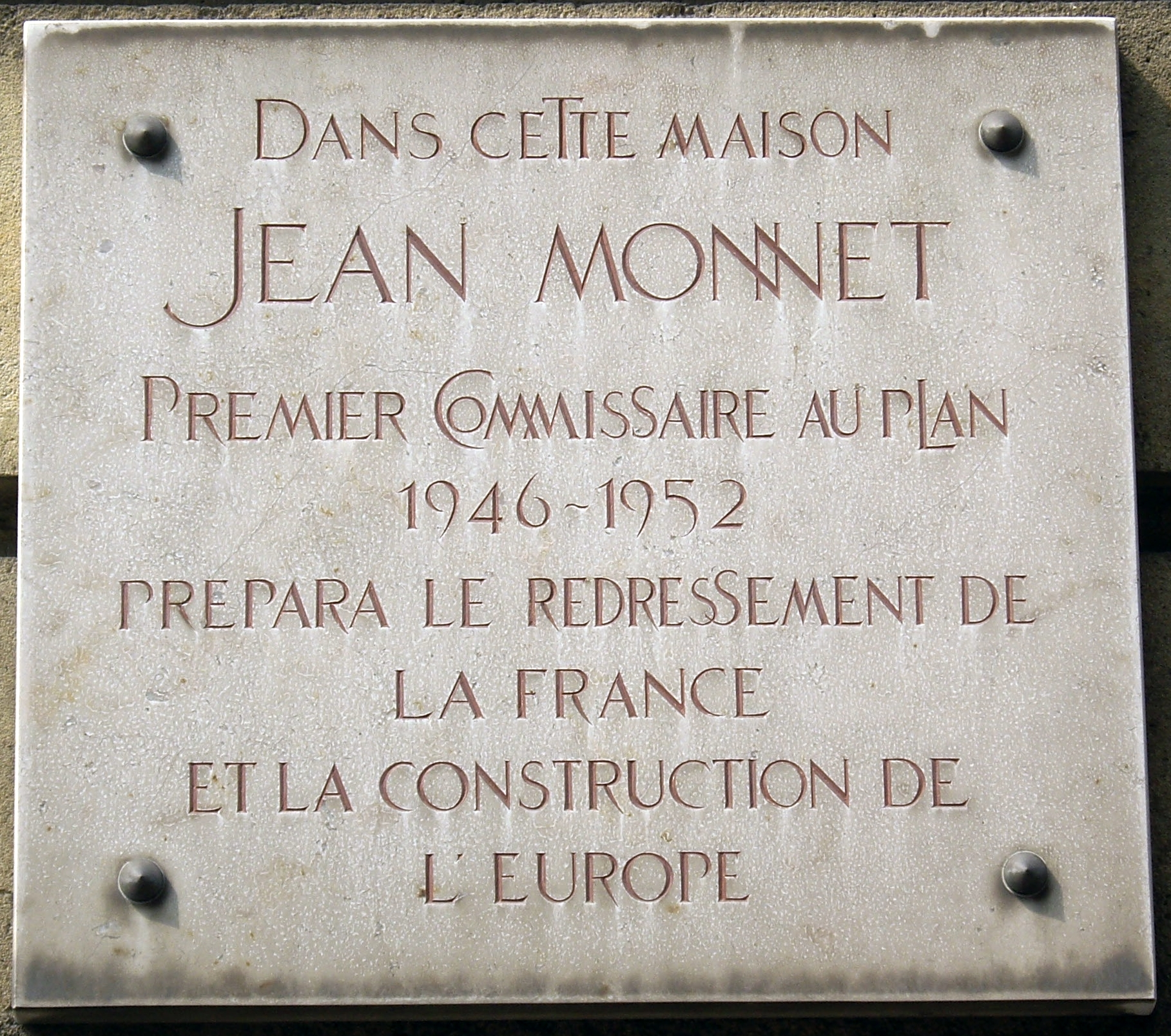 Plaque apposée au n° 18 de la rue de Martignac, Paris 7e, où séjourna Jean Monnet (1888-1979) à l'époque où il était commissaire au plan (1946-1952).